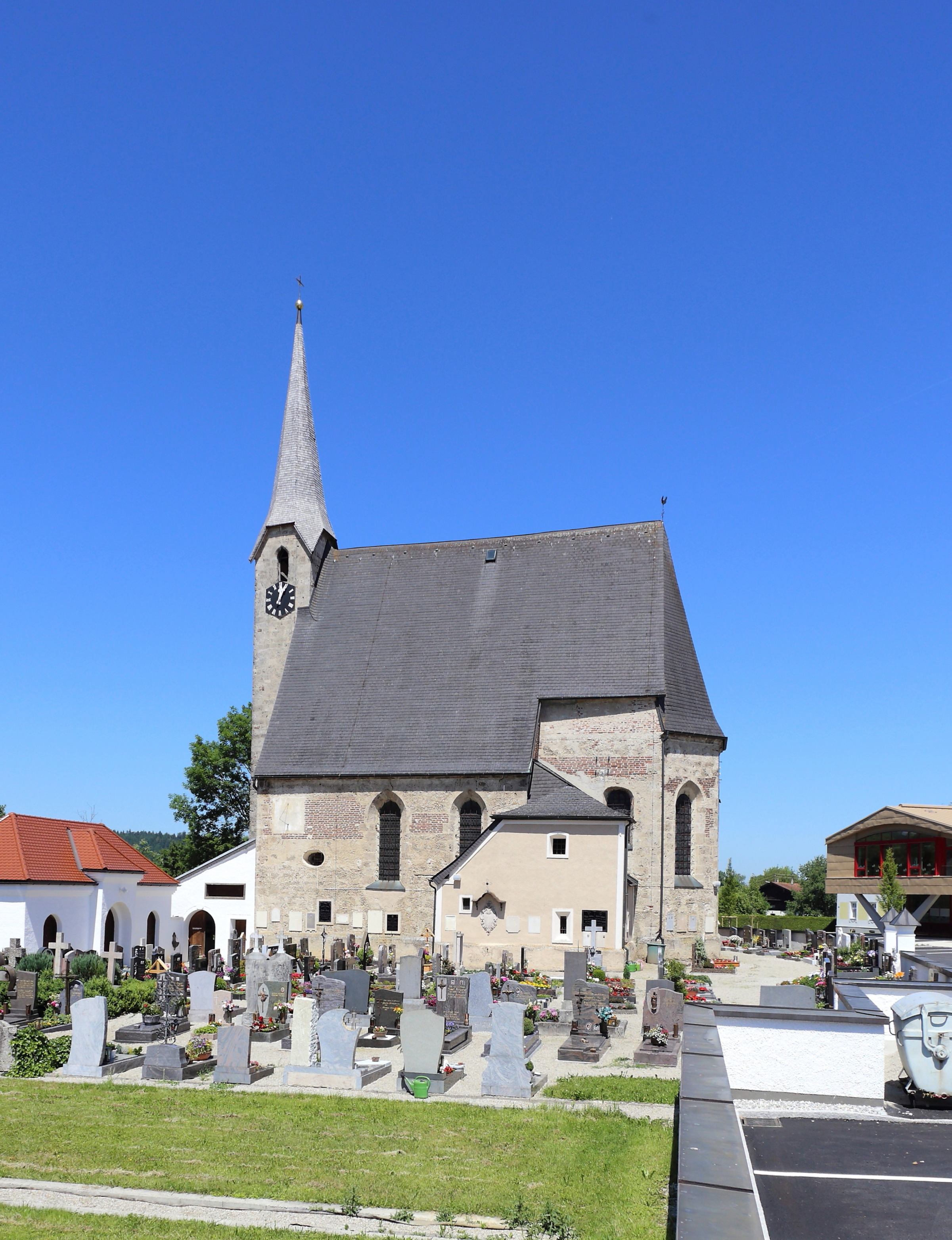 Südansicht der katholischen Pfarrkirche hl. Johannes in der oberösterreichischen Gemeinde Pfaffstätt. Eine gotische Kirche, die im Inneren barockisiert wurde.